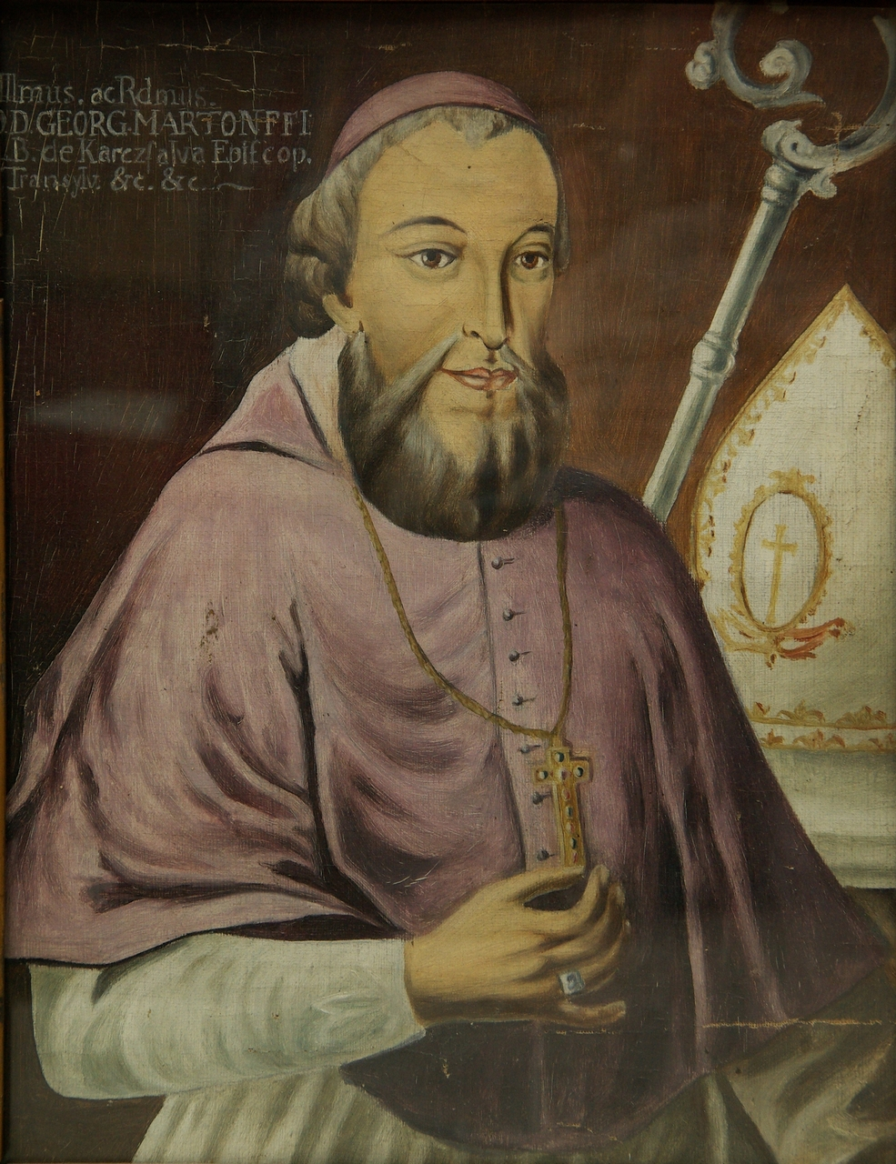 Mártonffy György erdélyi katolikus püspök.